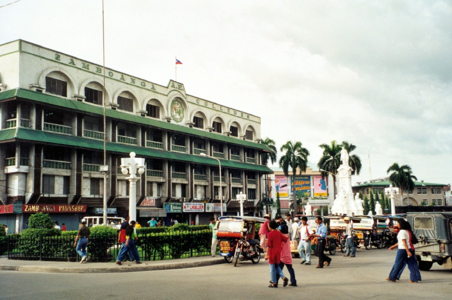 Philippinen: Zamboanga City College